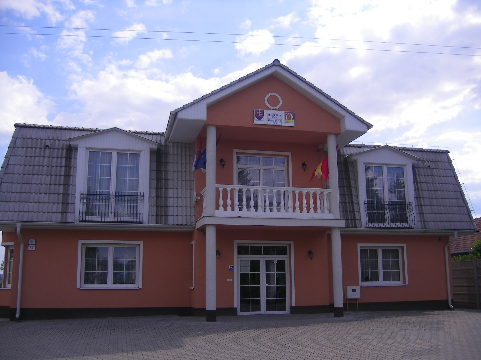 Ebed - községháza